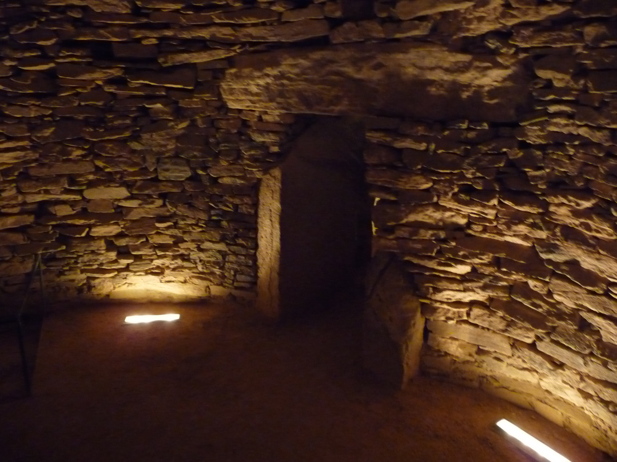 Antequera-p1010863.jpg